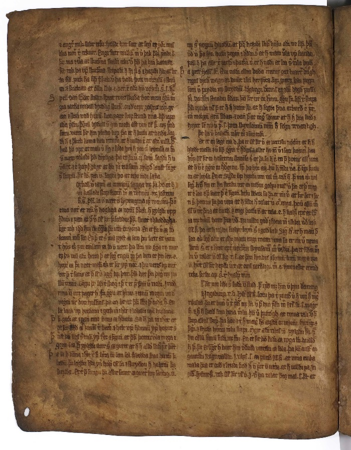 Óláfs saga Tryggvasonar AM 61 fol, bl. 64v